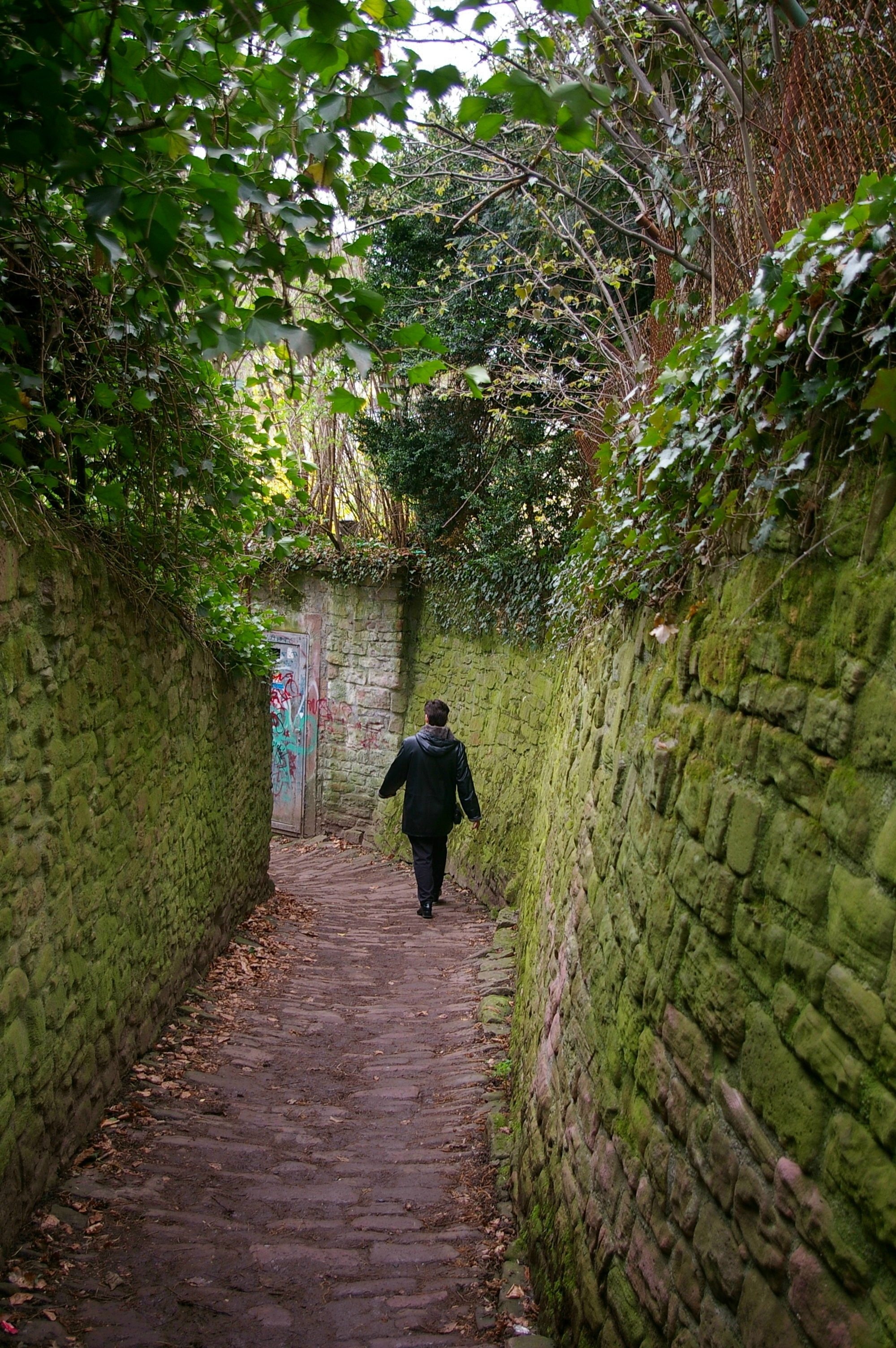 Schlangenweg in Heidelberg, gemauerte enge Gänge mit steilem Pflaster.